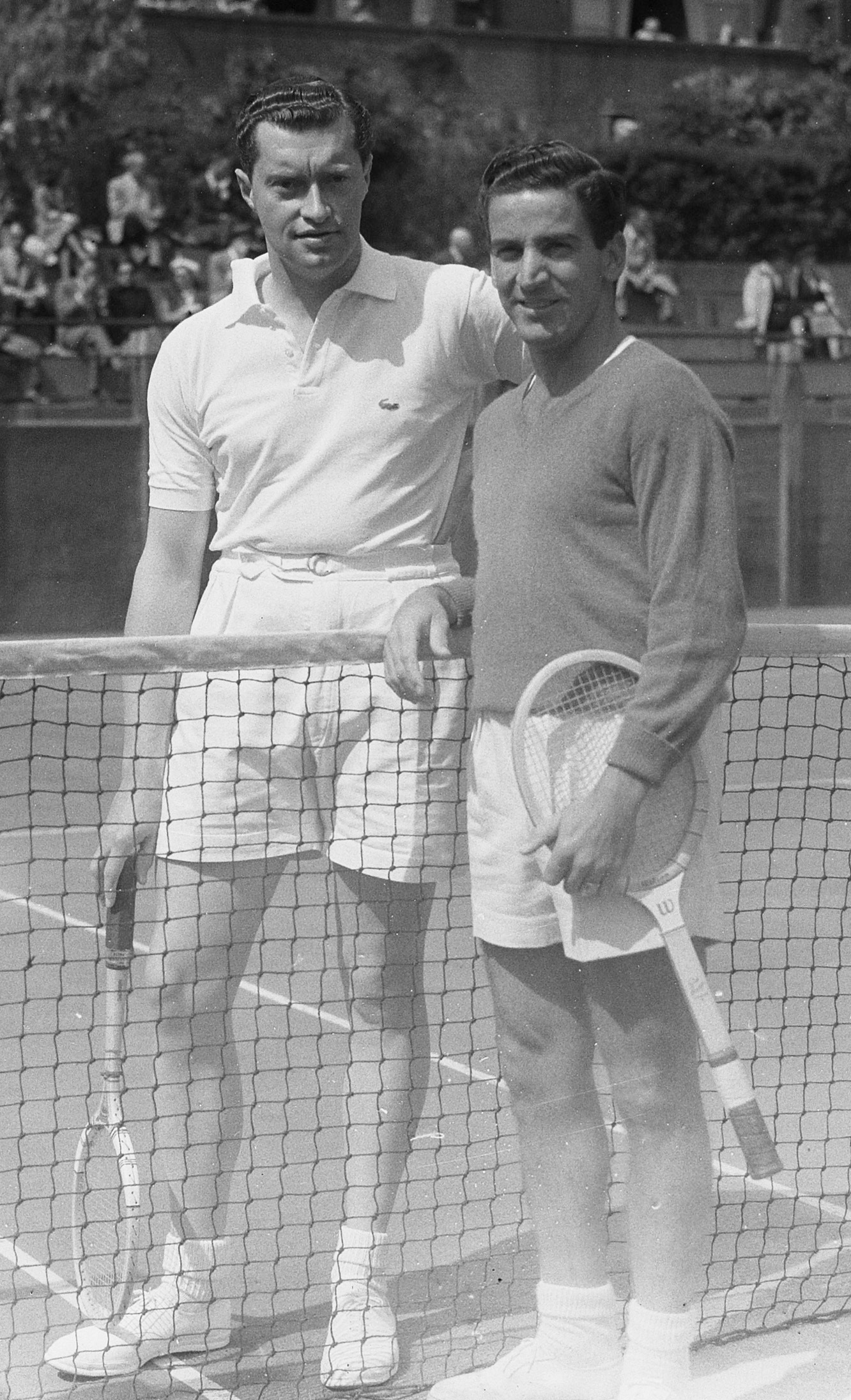 Tennis: Nederland tegen Brazilië. Links Huib Wilton, rechts Vierra